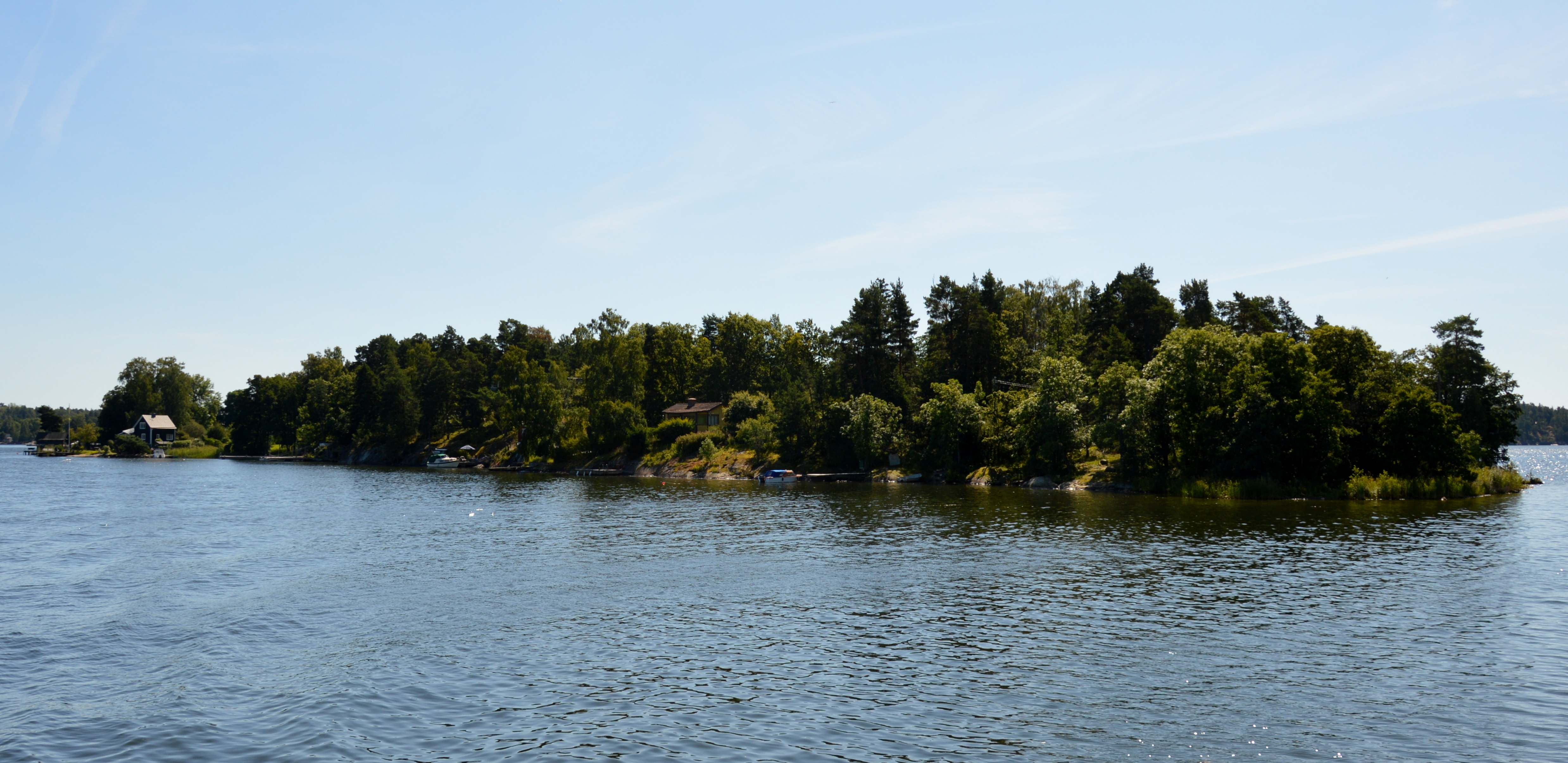 Kalvholmen